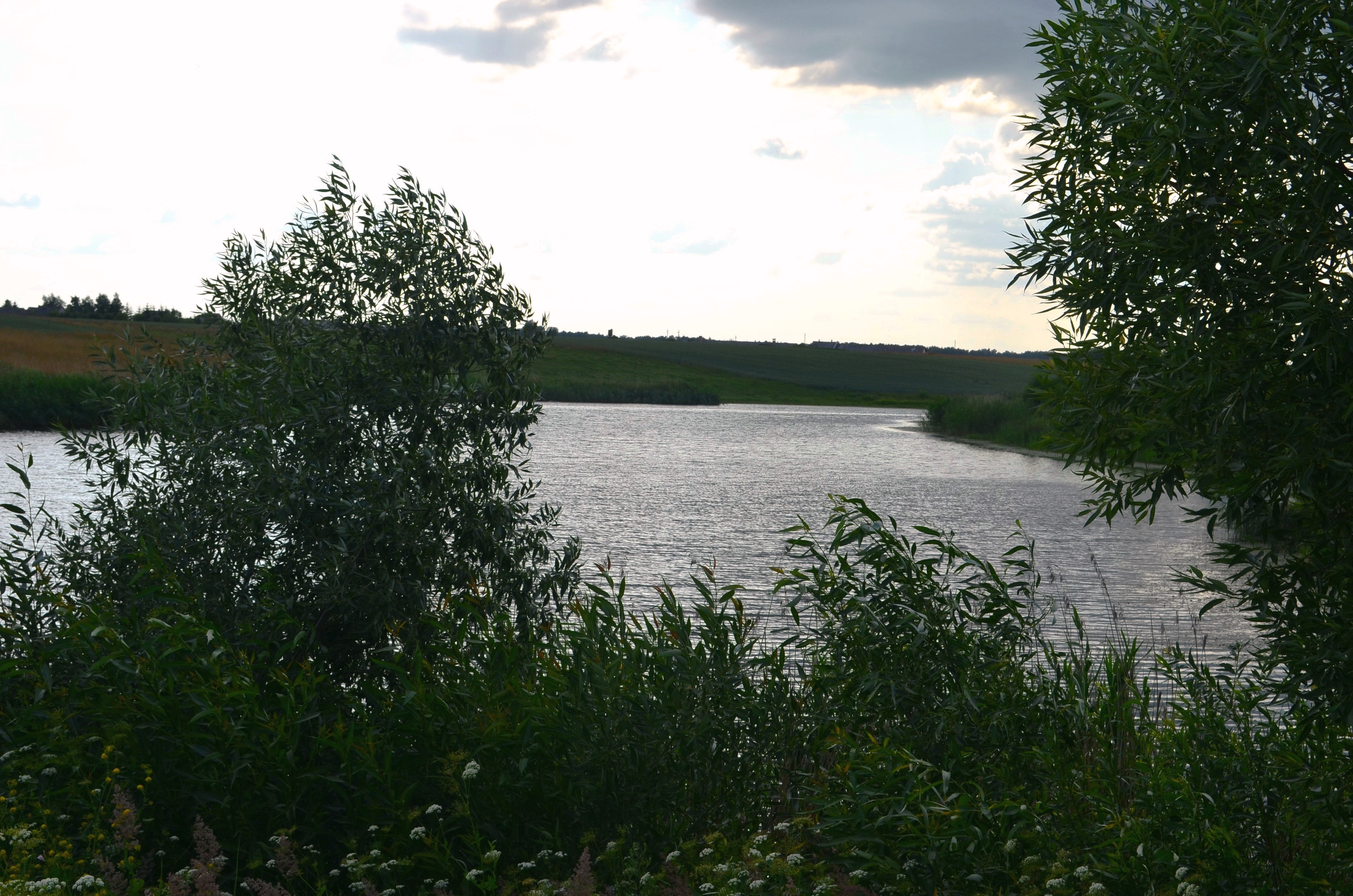 Putnupio tvenkinys, Kampai I, Kėdainių raj.